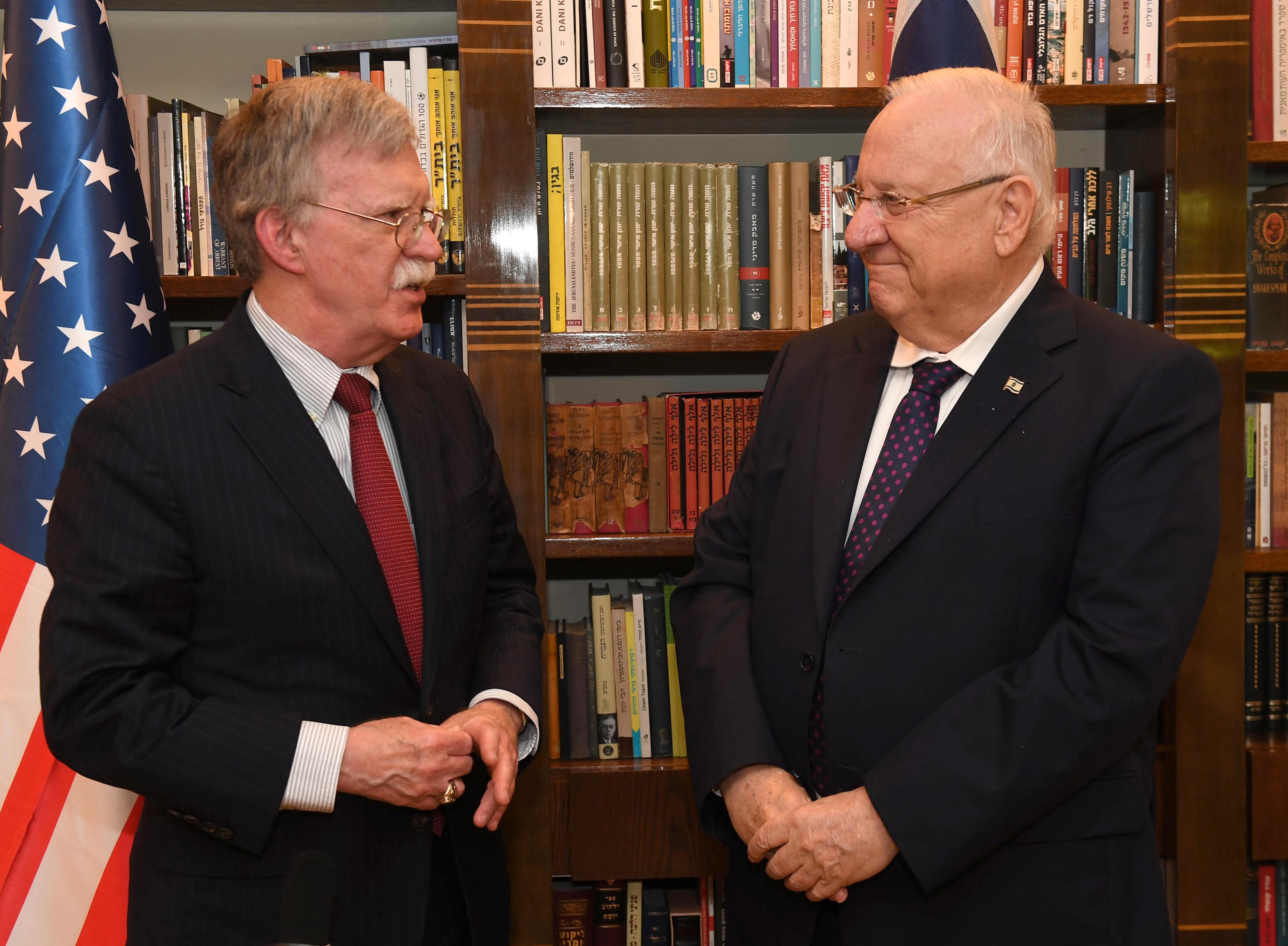 ראובן ריבליו נשיא מדינת ישראל נפגש עם היועץ לביטחון לאומי של ארצות הברית ג'ון בולטון המבקר בישראל